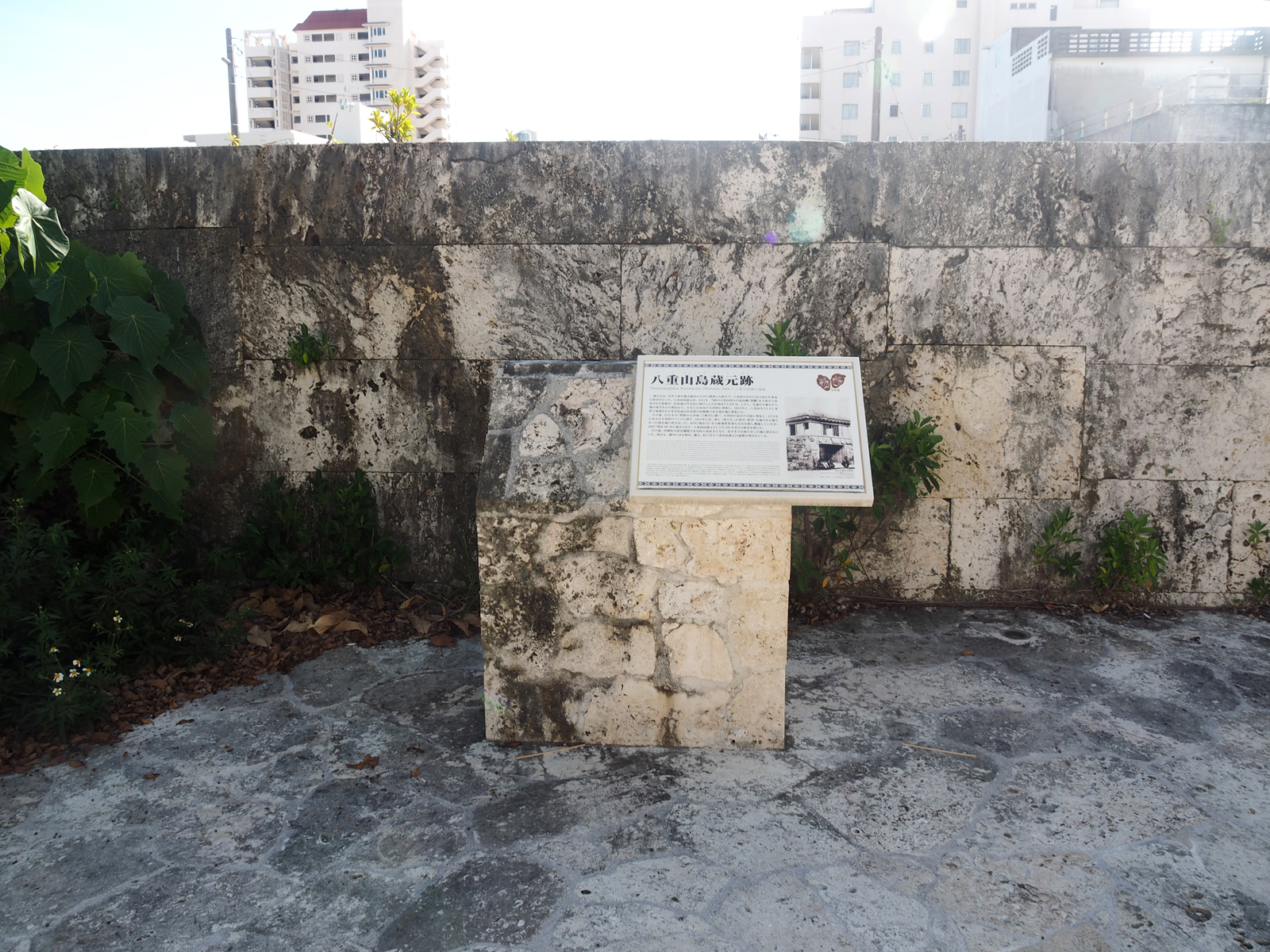 八重山蔵元跡 (沖縄県石垣市)